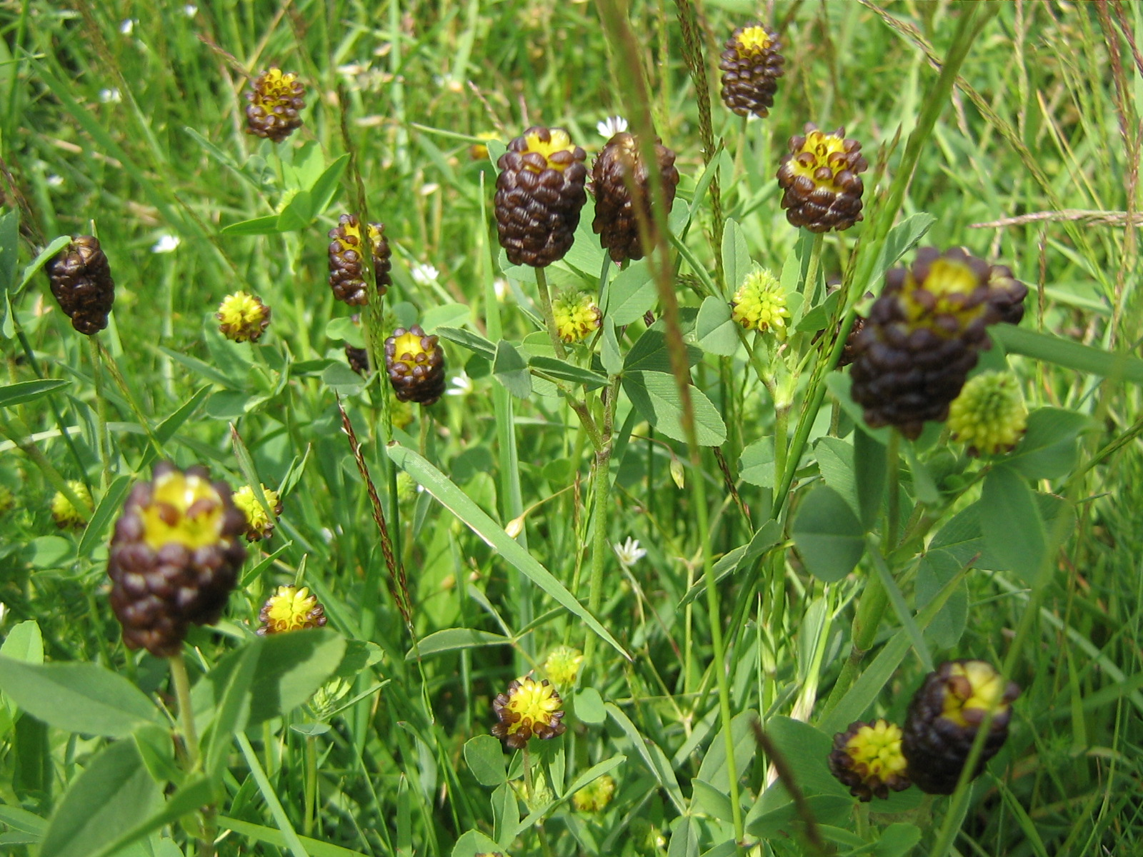 Trèfle en spadices (Trifolium spadiceum) dans les monts d'Aubrac (Massif central, France). Altitude du site : 1 130 m.